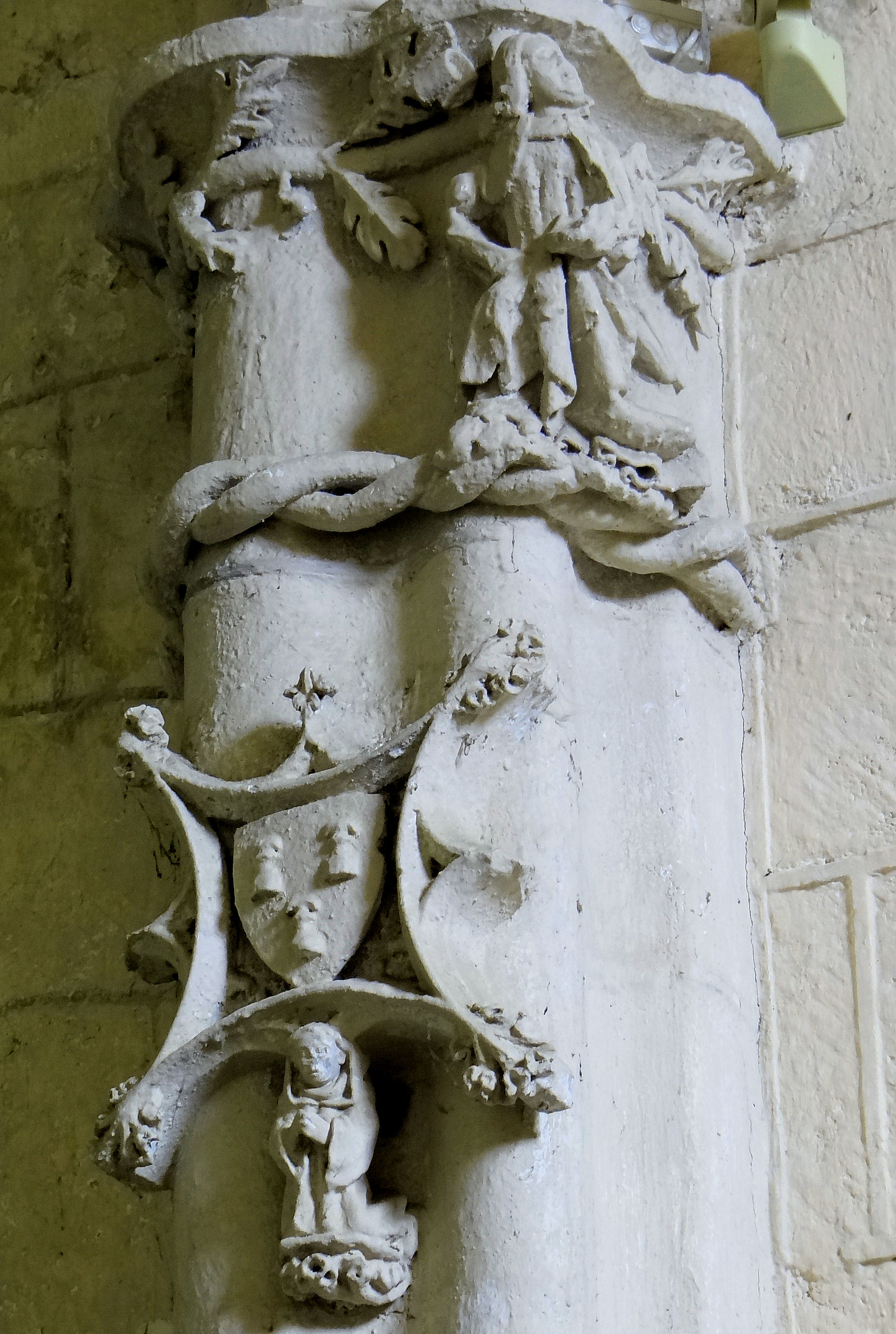 Castelnau-Pégayrols - Église Saint-Michel - Chapelle sur la tribune : armoiries de la famille de Castelnau .